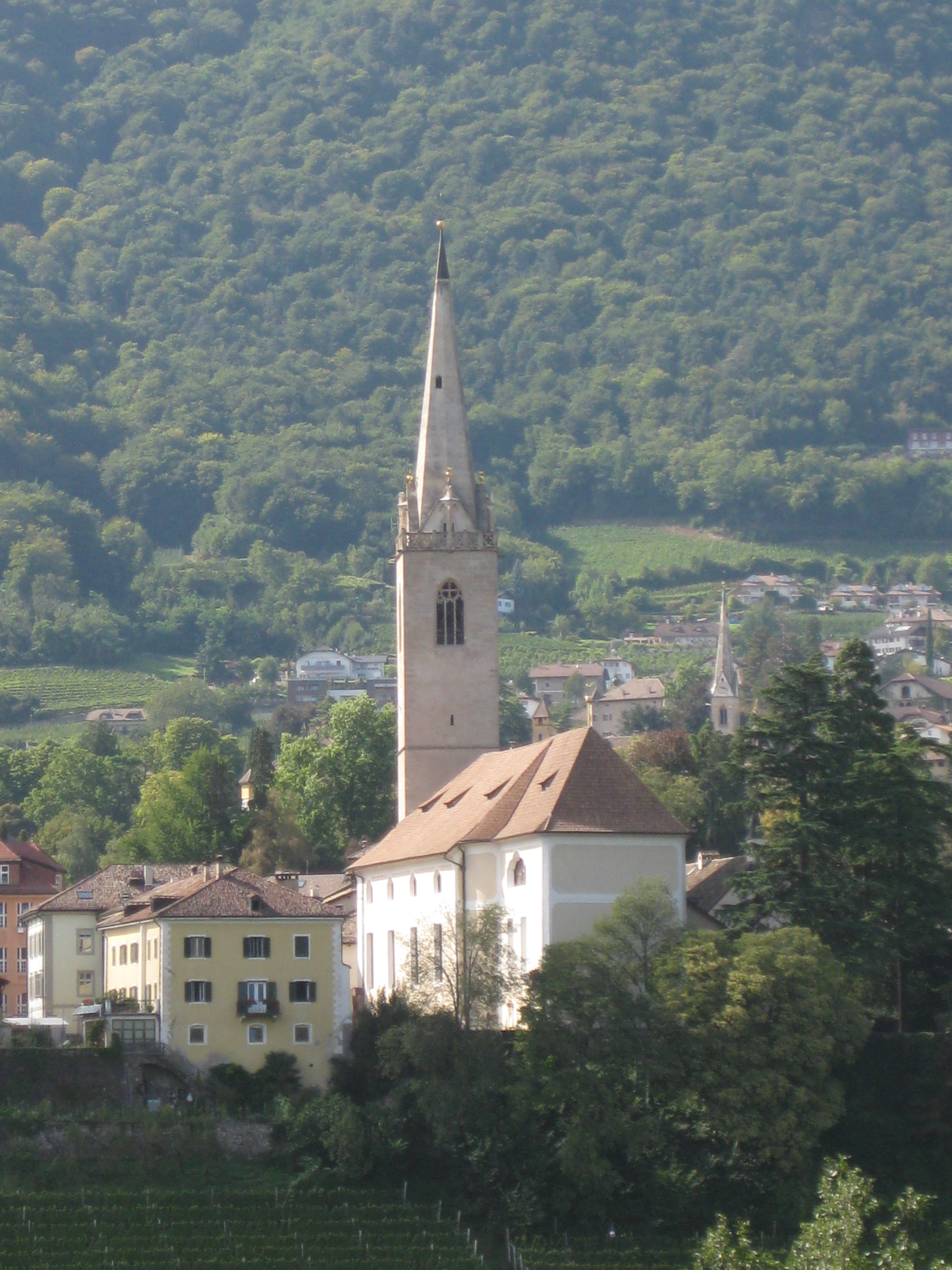 Pfarrkirche und Pfarrwidum (das gelbe Gebäude neben der Kirche) in Kaltern von Osten gesehen